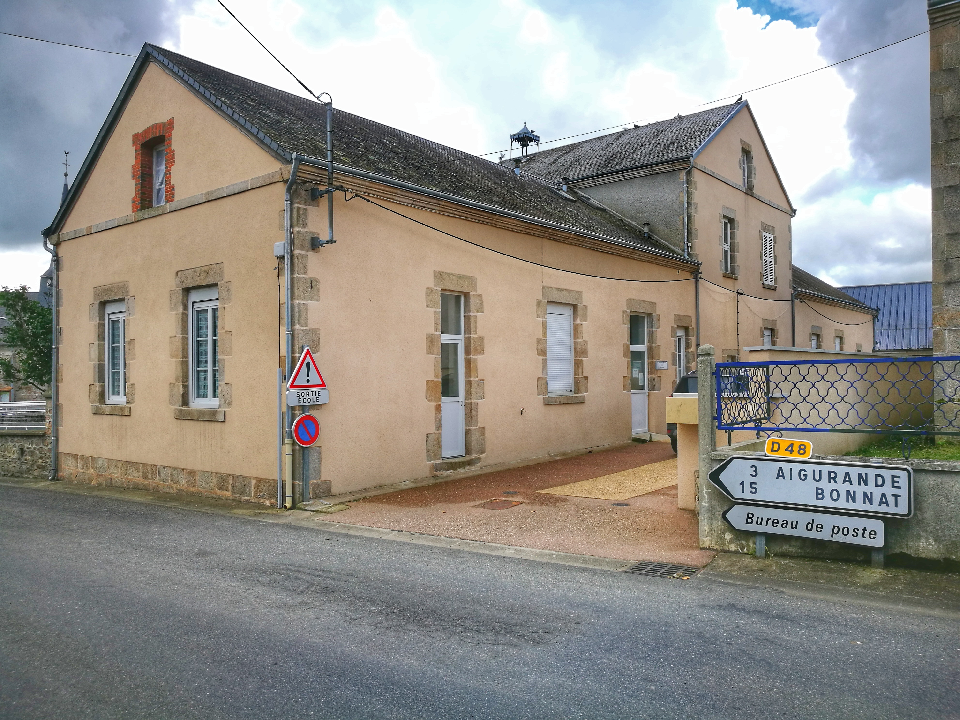 Vue du bâtiment de la mairie de la commune de Lourdoueix-Saint-Pierre, Creuse, France, depuis la rue principale du village.